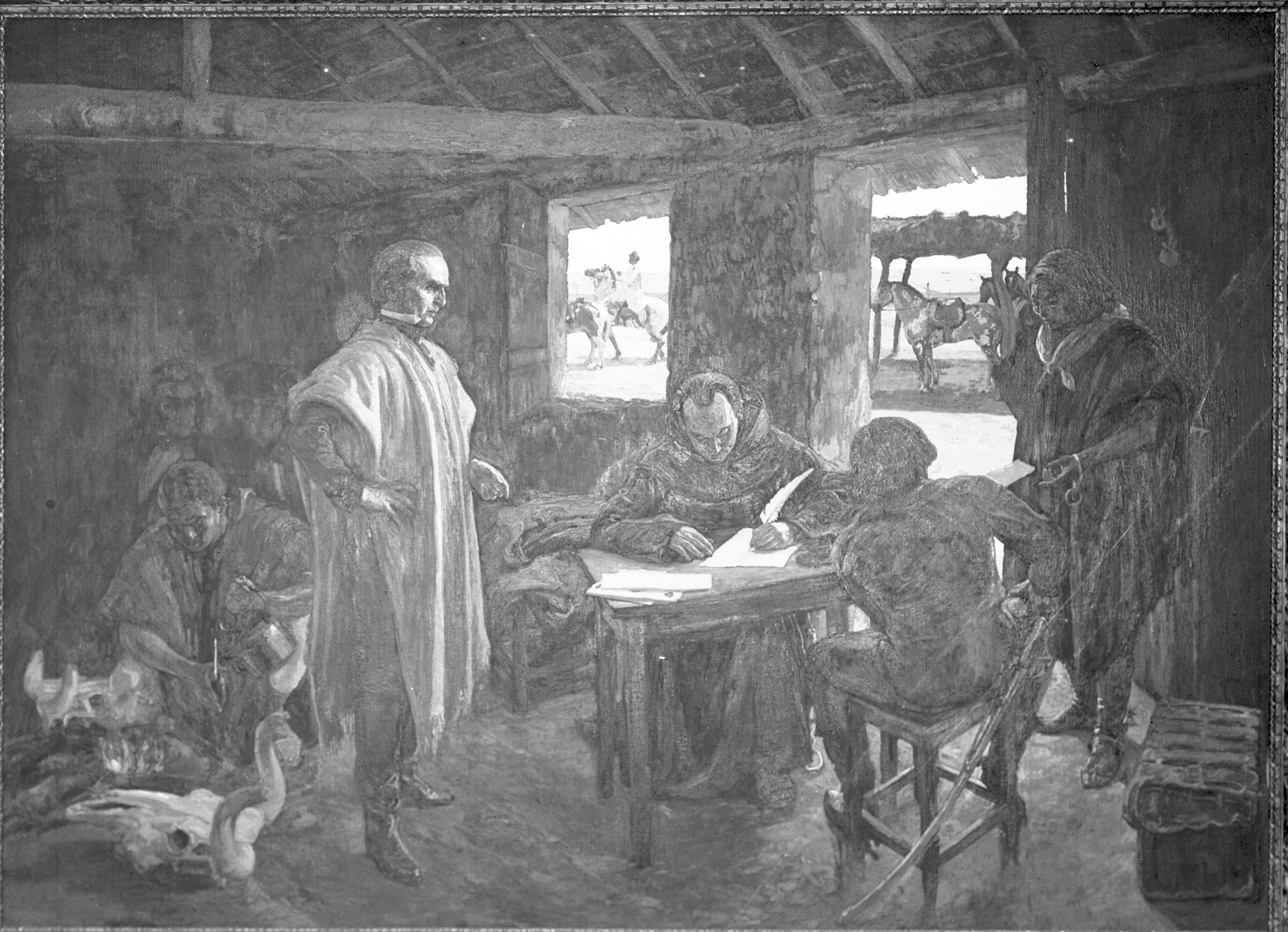 Dibujo del pintor Diógenes Hecquet (1866-1902) en el que José Gervasio Artigas dicta a su secretario José Monterroso.